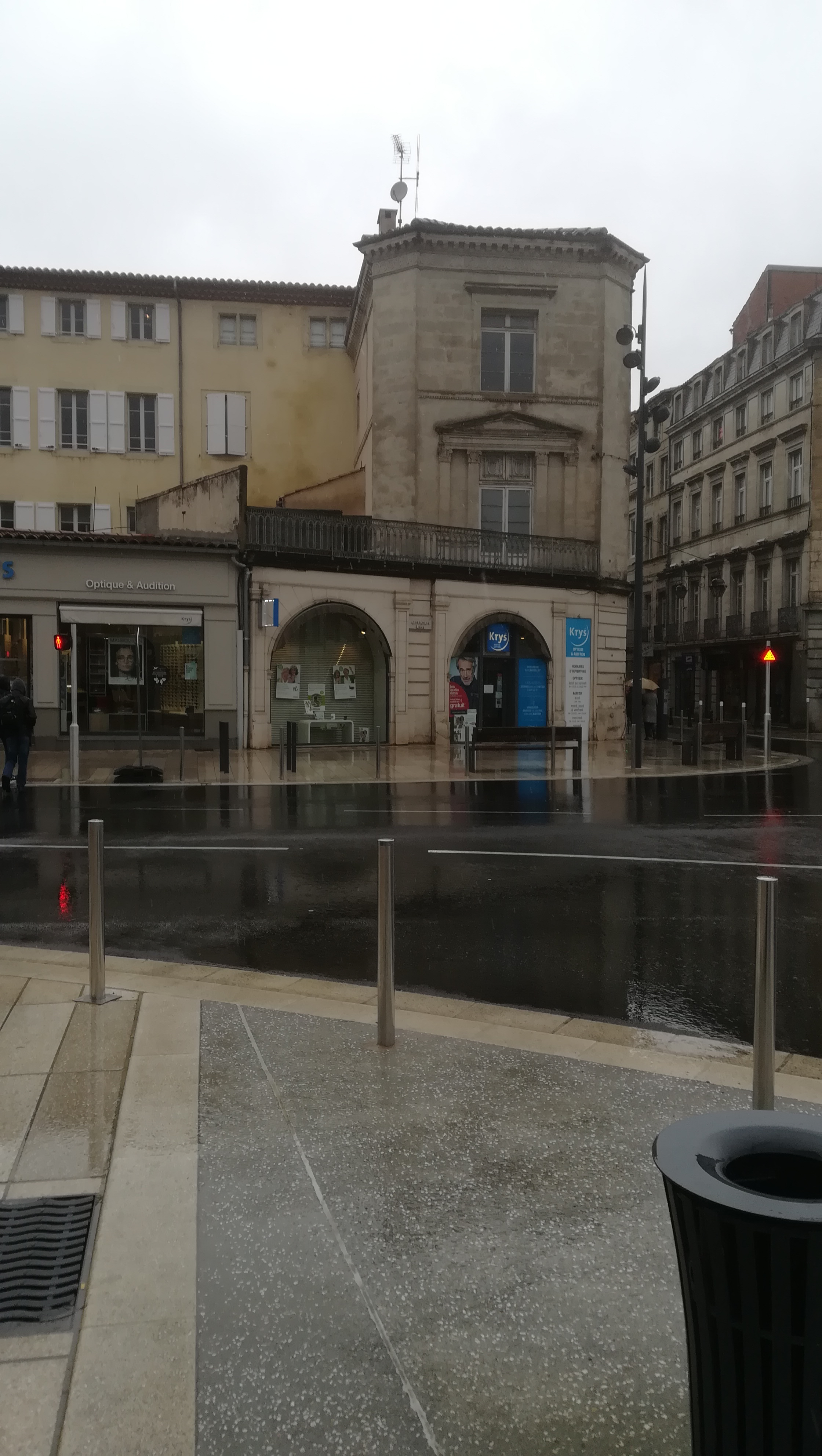 Hotel du comte de Saint Maur, Castres, Tarn